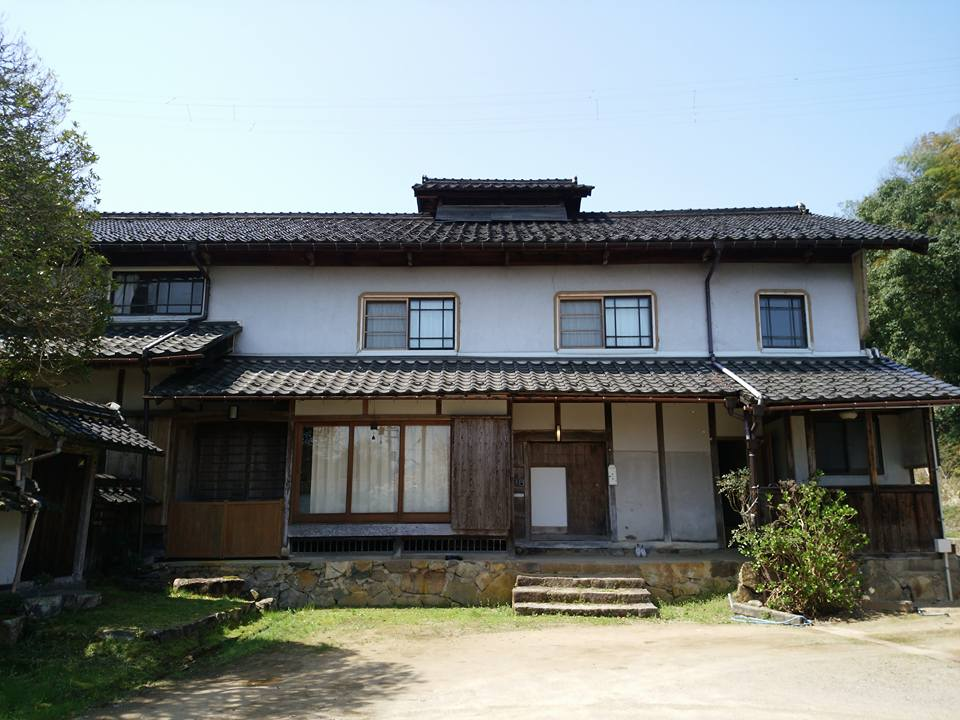 旧中和家住宅主屋